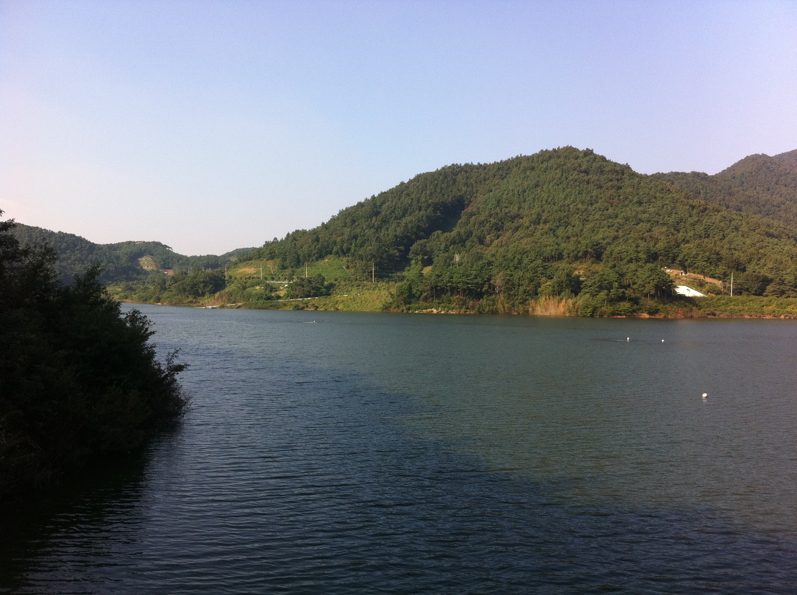 장성 평림댐 #13